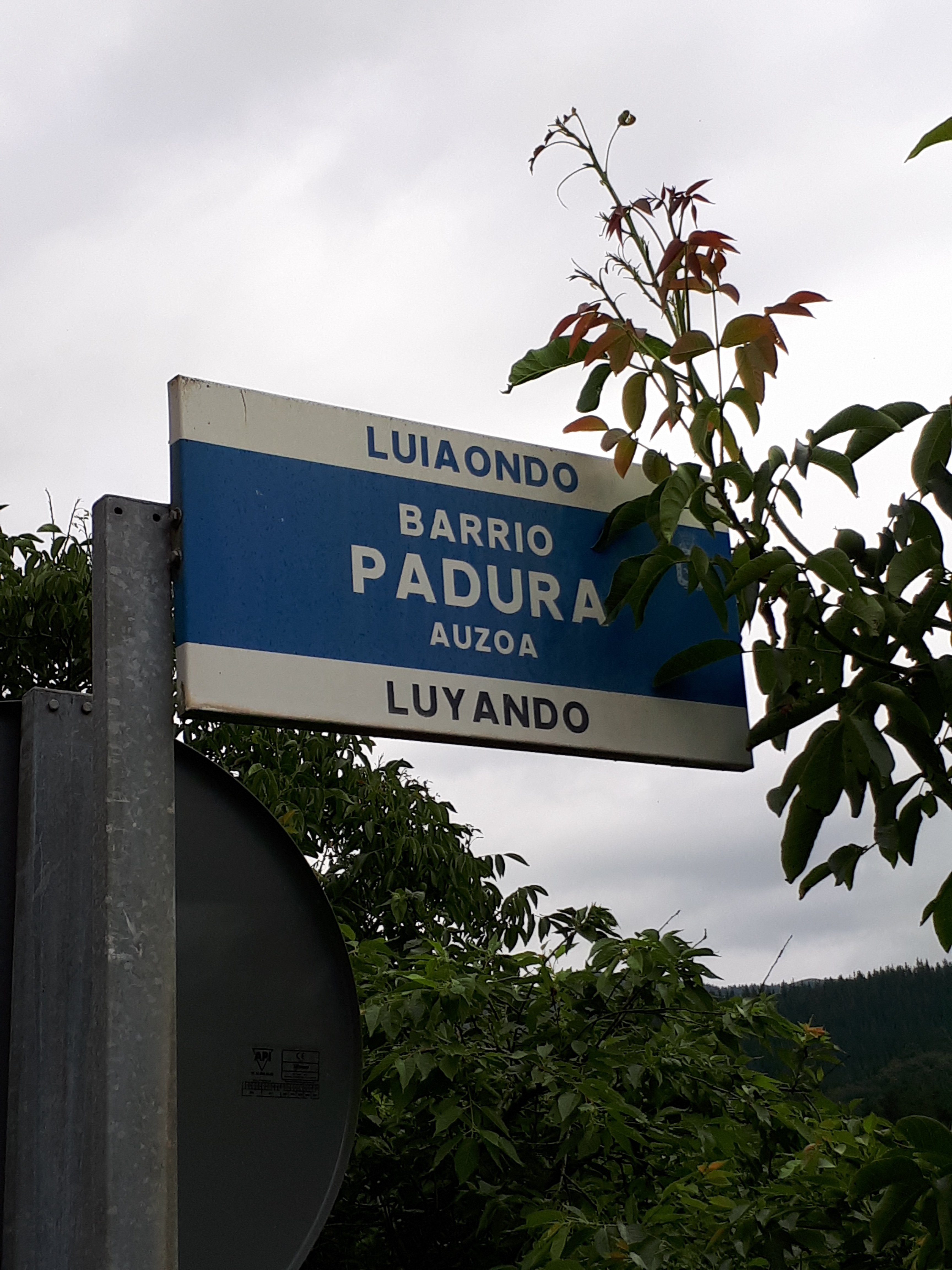 Señalización barrio Padura en Luiaondo